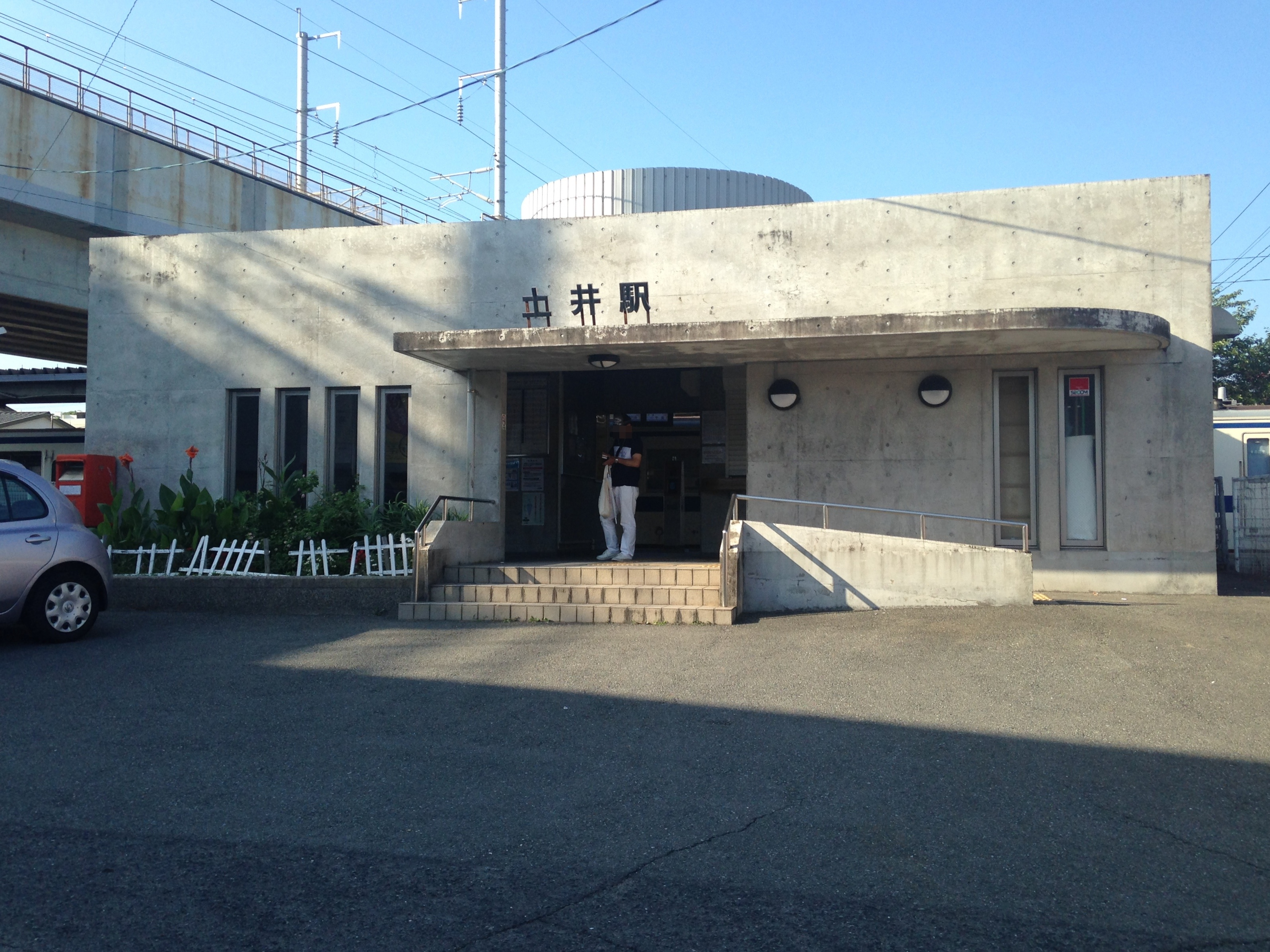 土井駅駅舎